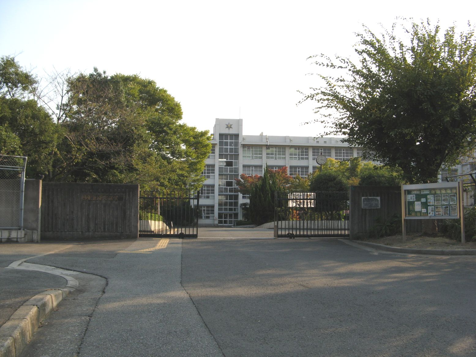 大阪府立平野高等学校